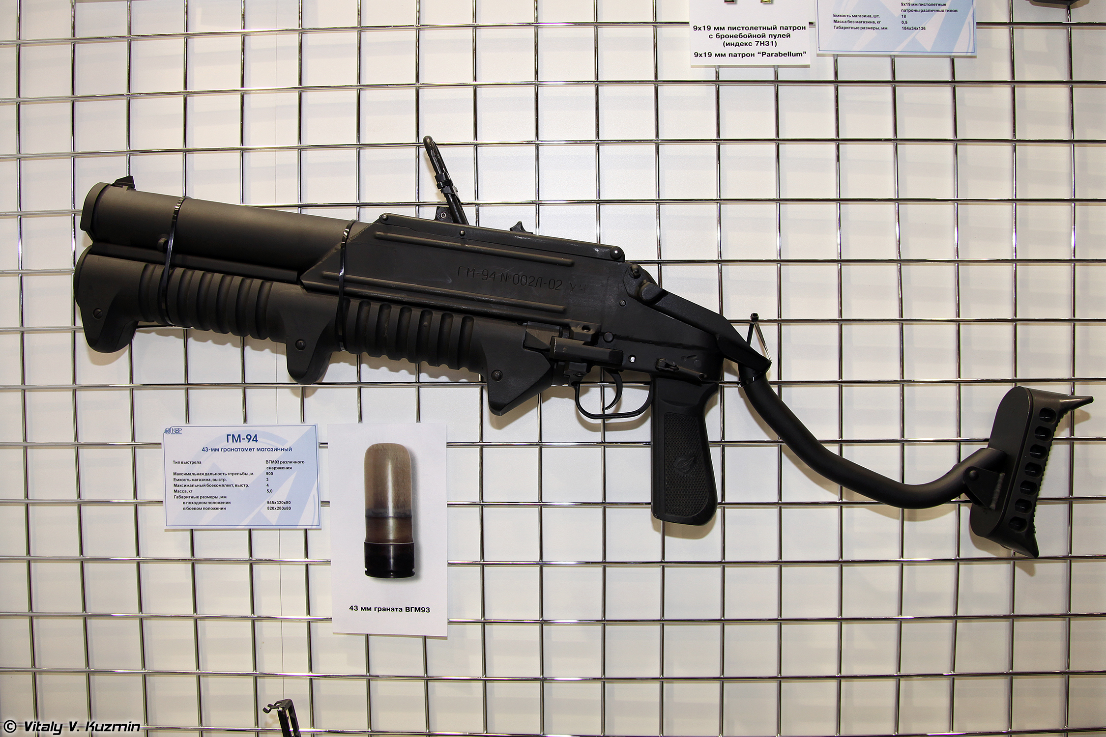 Гранатомет магазинный ГМ-94 (GM-94 grenade launcher)